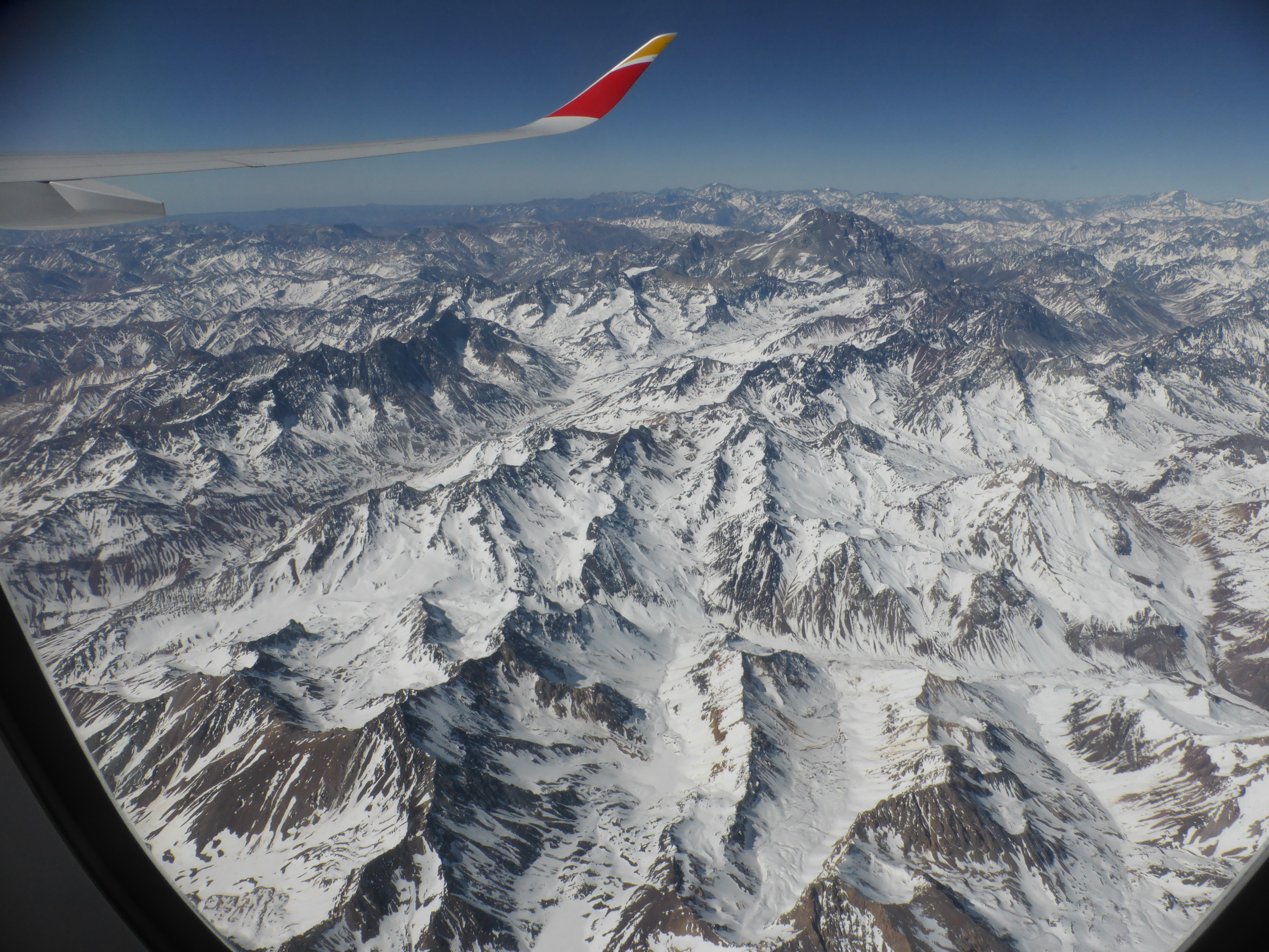 Invierno austral. Cordillera de los Andes. Subregión: "Andes áridos", de los Andes australes. Fotografía tomada desde un avión de Iberia, volando directamente entre Santiago de Chile y Madrid. Frontera entre Chile y Argentina.